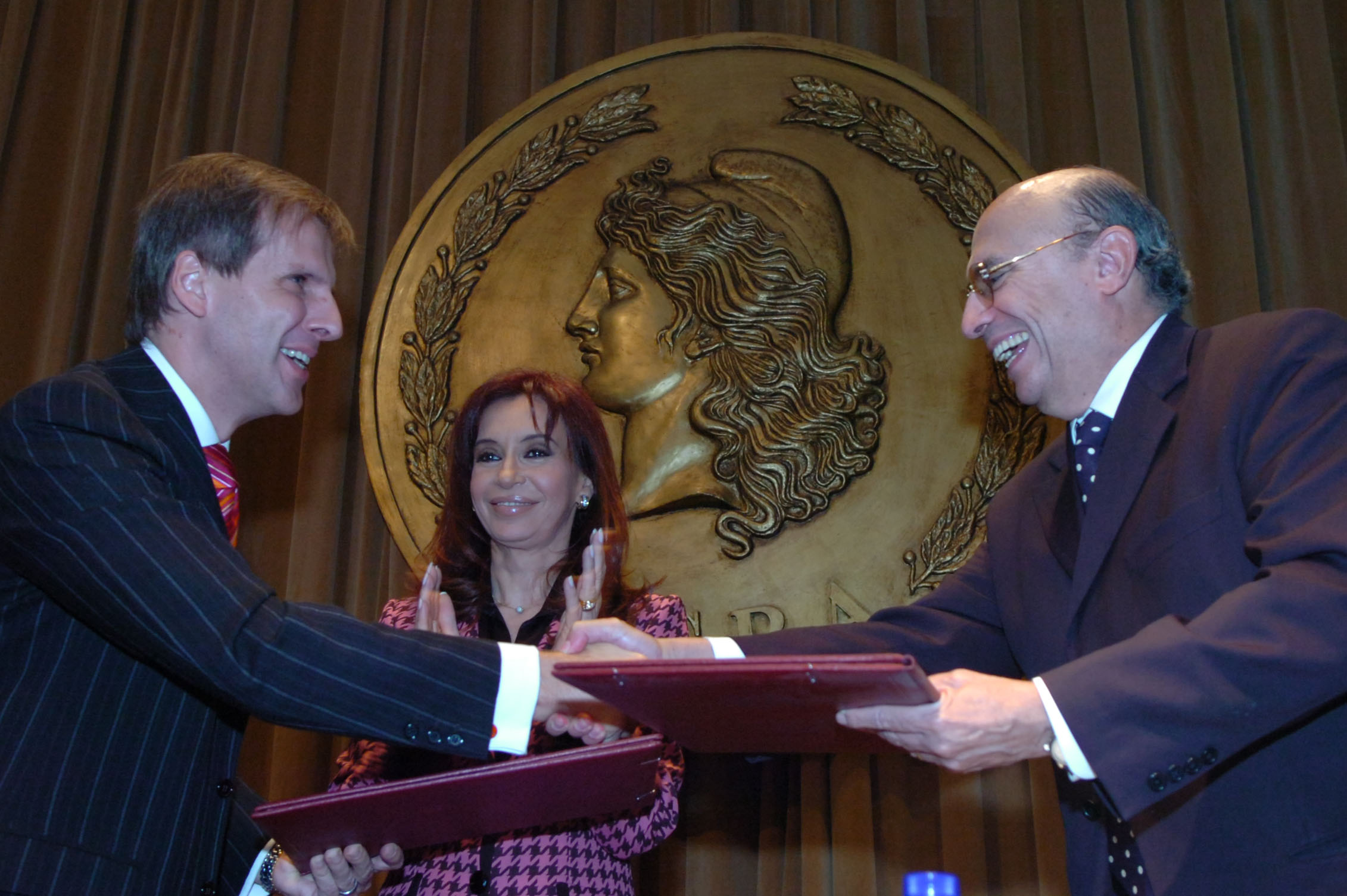 Cristina Fernández junto al titular del Banco Central de la República Argentina, Martín Redrado, y su par de Brasil, Henrique Campos Meireles